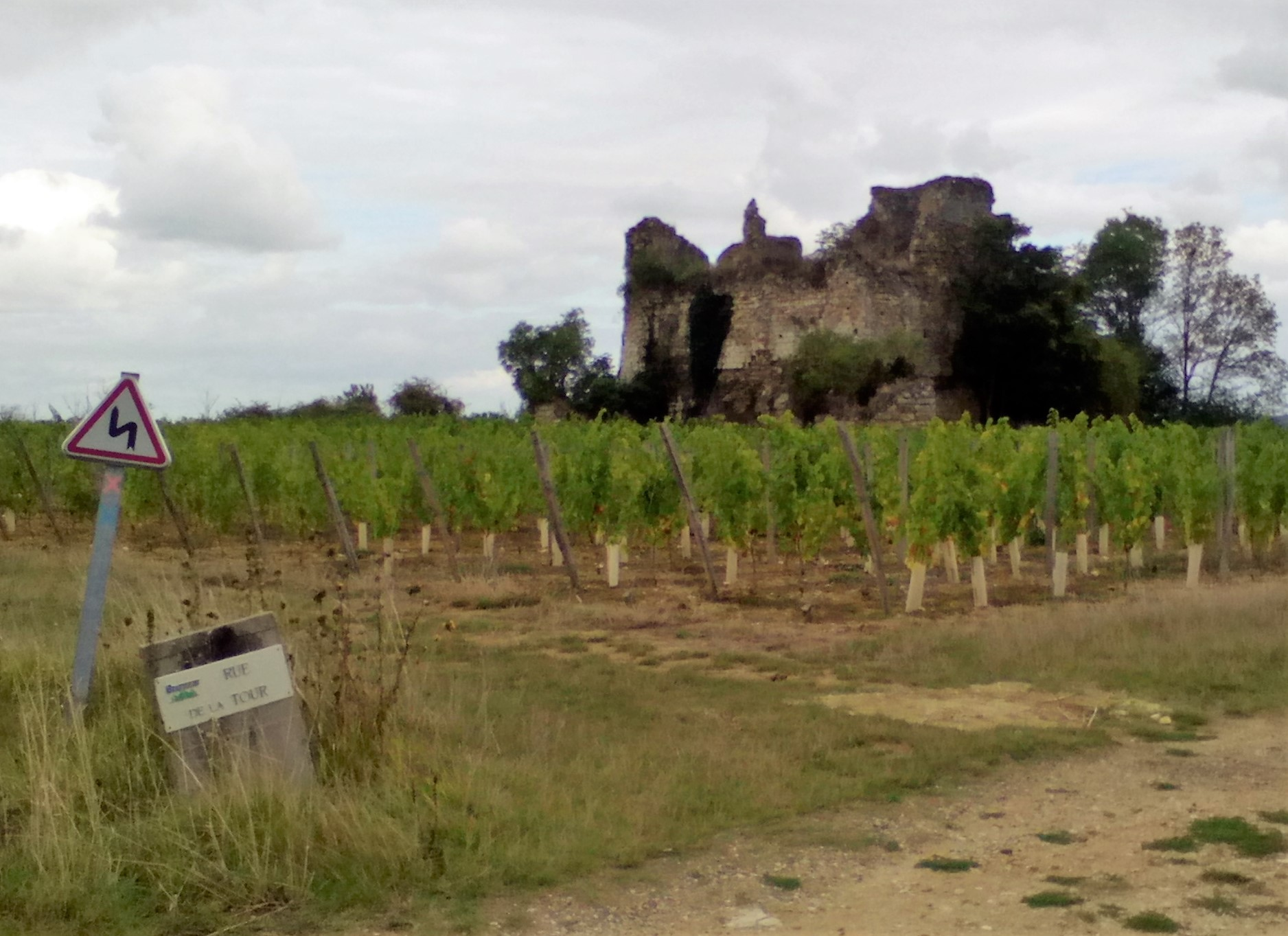 La Tour de Beaumont sur les hauteurs du bourg de Beaumont sur la commune de Beaumont-Saint-Cyr